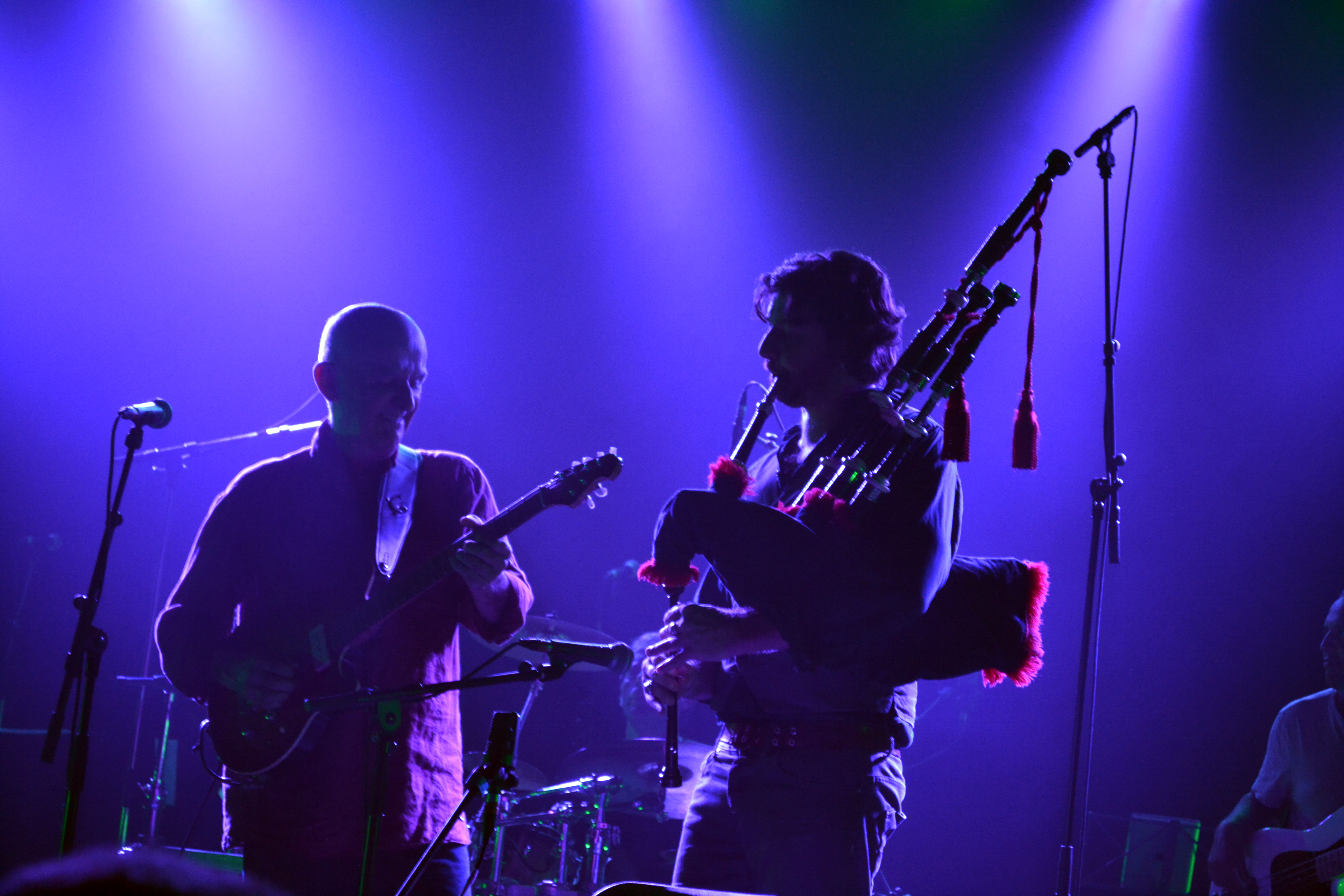 Spectacle Célébration de Dan Ar Braz à l'occasion de la Jap'Noz à Plouider le 17 août 2013.